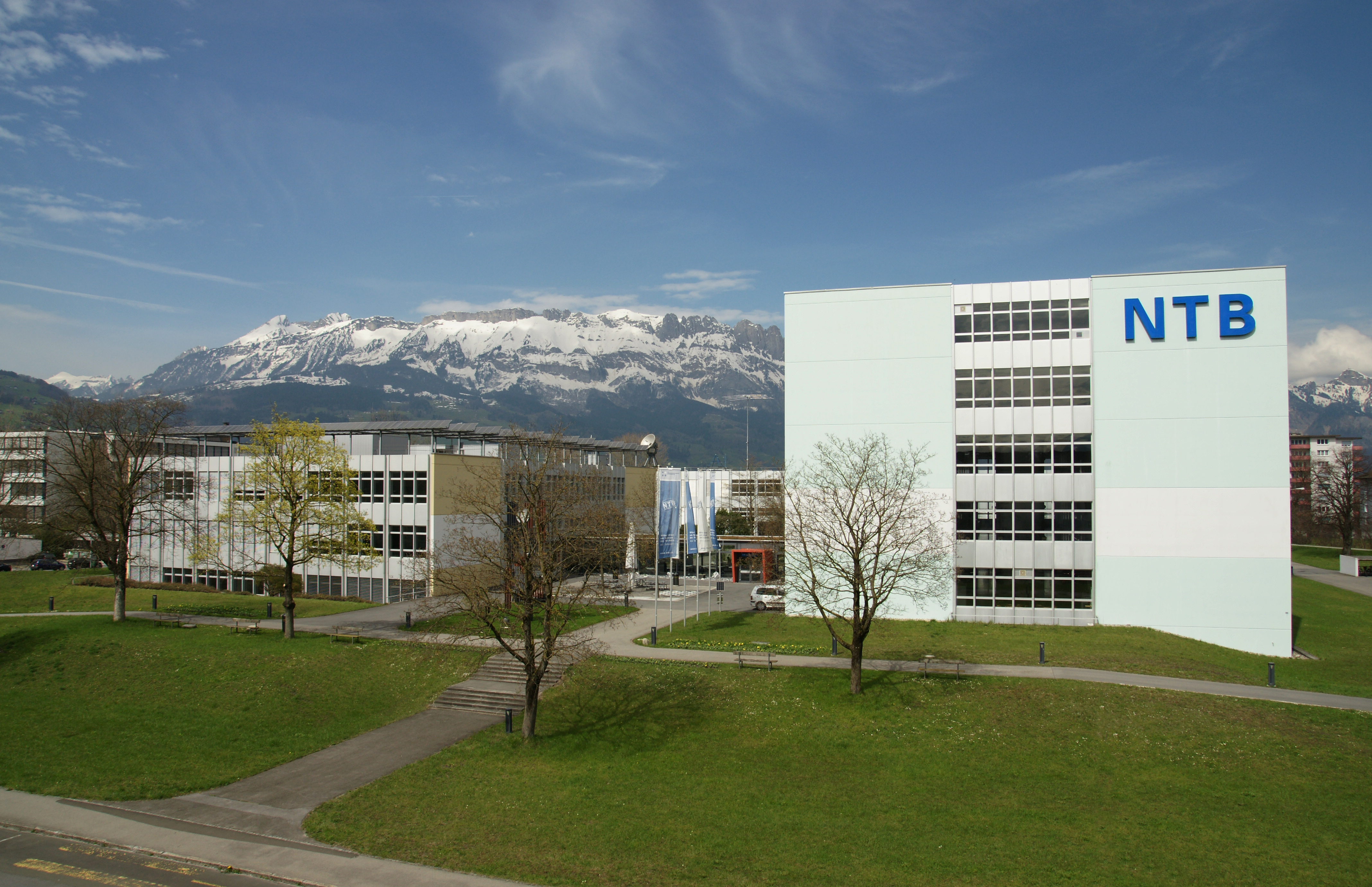 Neutechnikum Buchs - Aufnahmestandort im gegenüberliegenden Wohnhaus